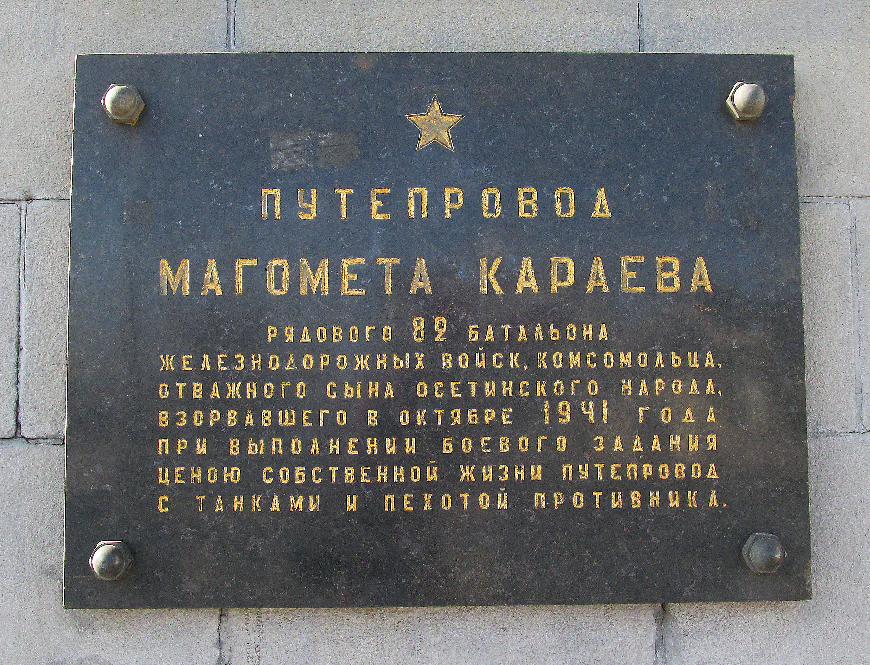 Анотаційна дошка шляхопроводу Магомета Караєва (Харків, вул. Полтавський Шлях)